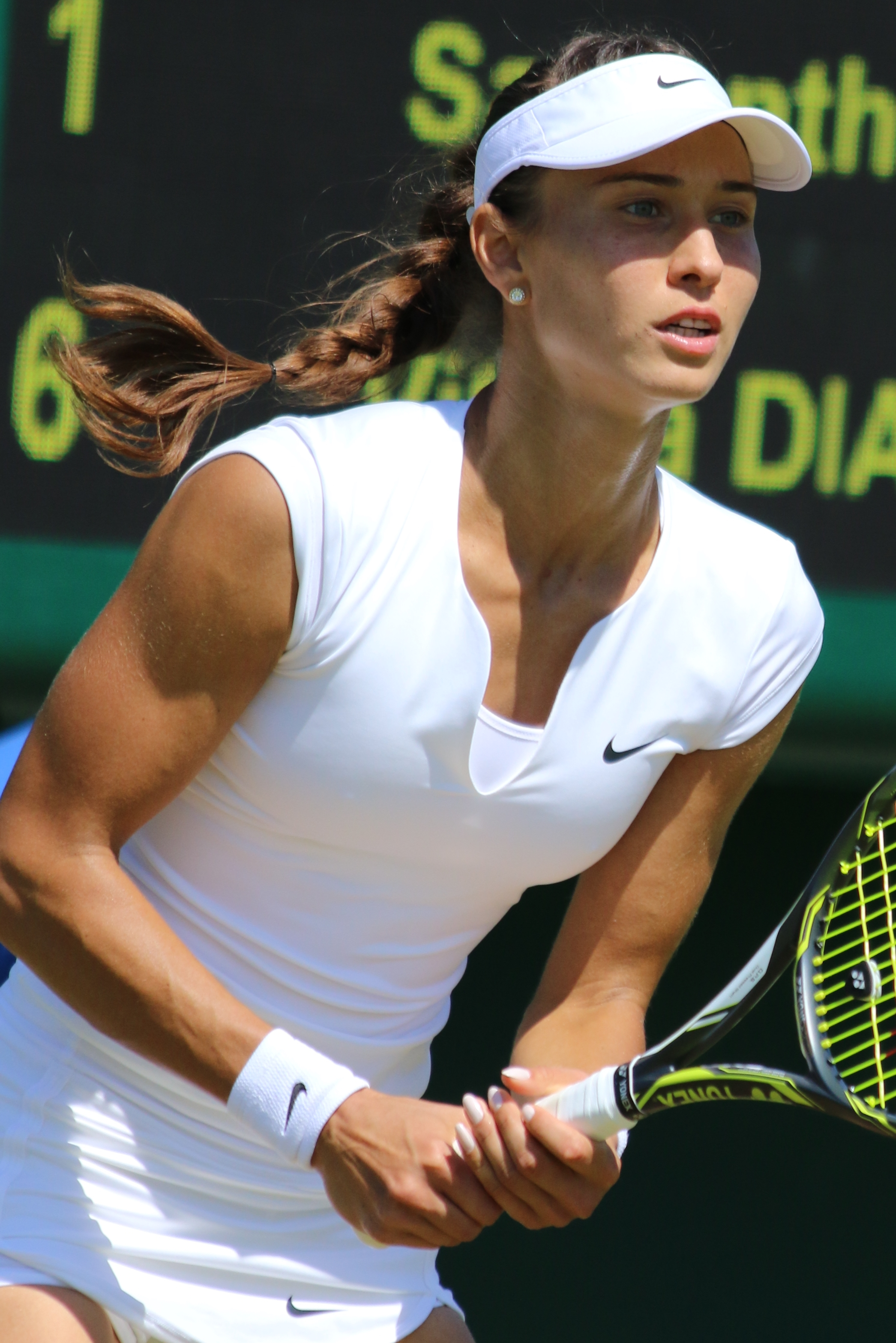 Diatchenko WMQ18 (6)